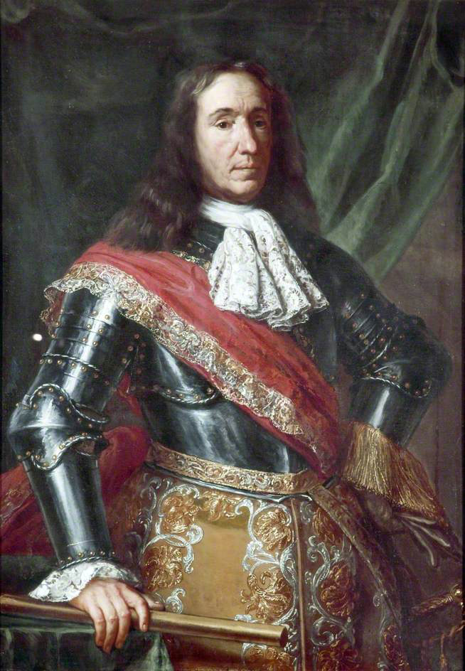 Беларуская (тарашкевіца): Партрэт Міхала Казімера Радзівіла (Michał Kazimier Radzivił)